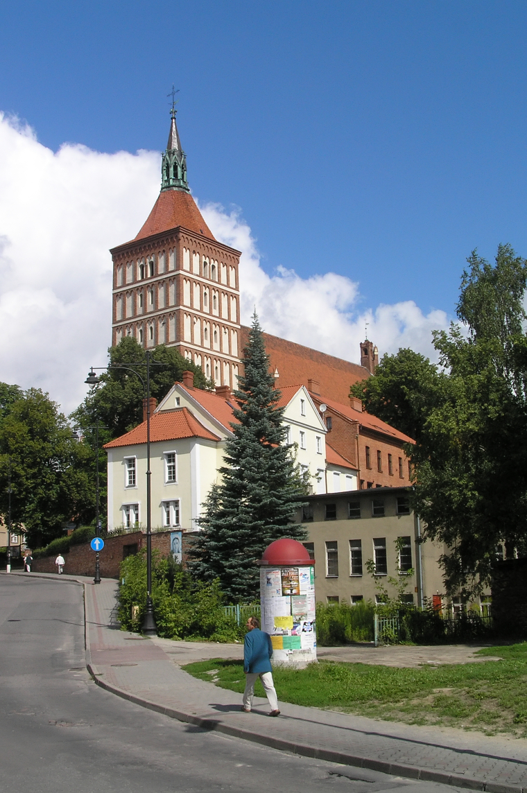 Olsztyn Katedra